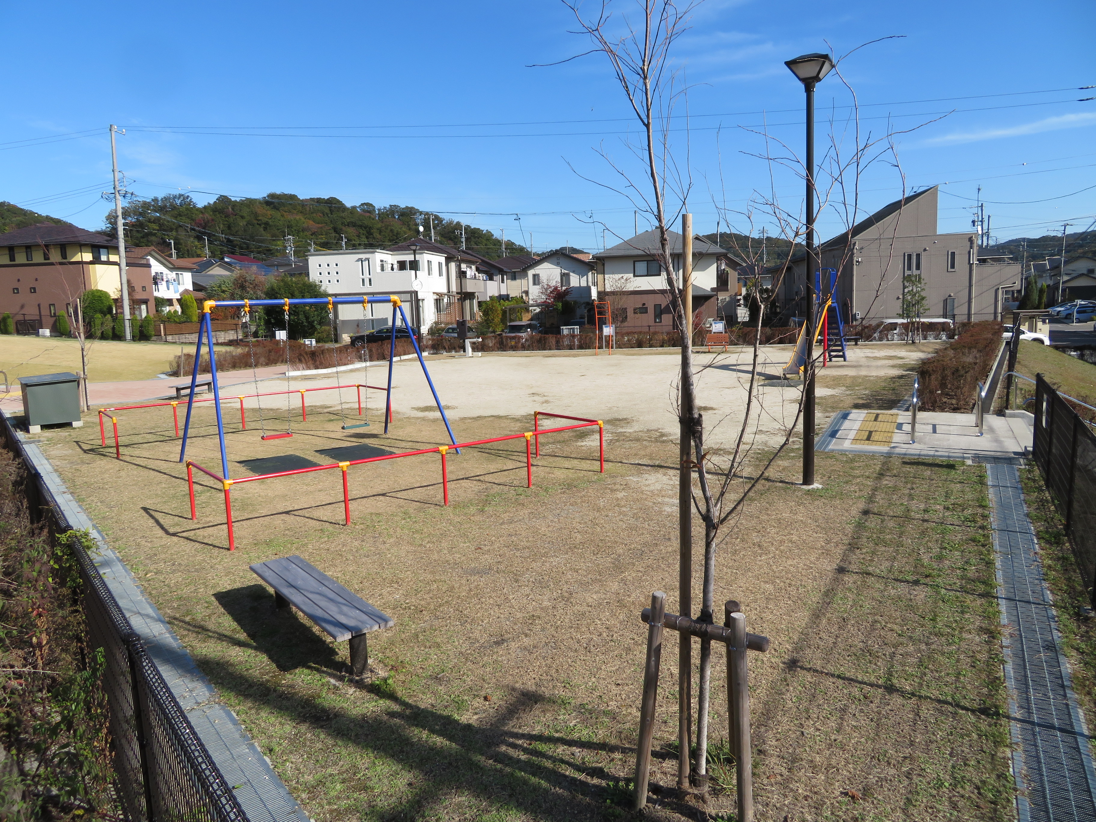 吉祥南公園（岡崎市真伝吉祥）